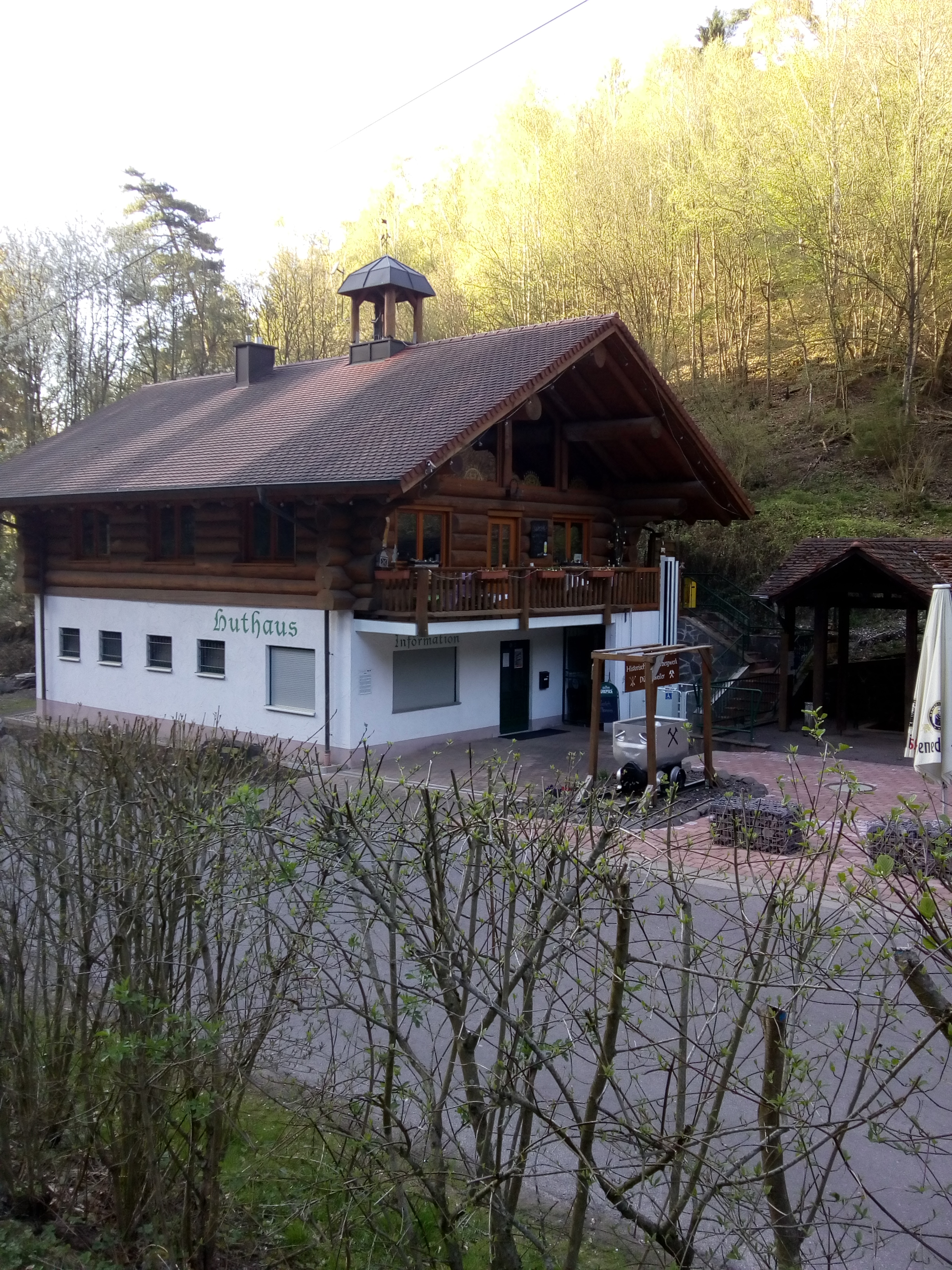 Das Huthaus ist das Informationshaus des Kupferbergwerks. Es beherbergt die Tourist-Info und ein Restaurant (behindertengerechter Zugang)